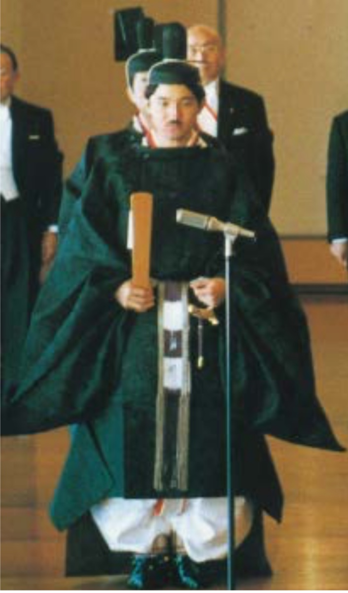 束帯を着用した秋篠宮文仁親王